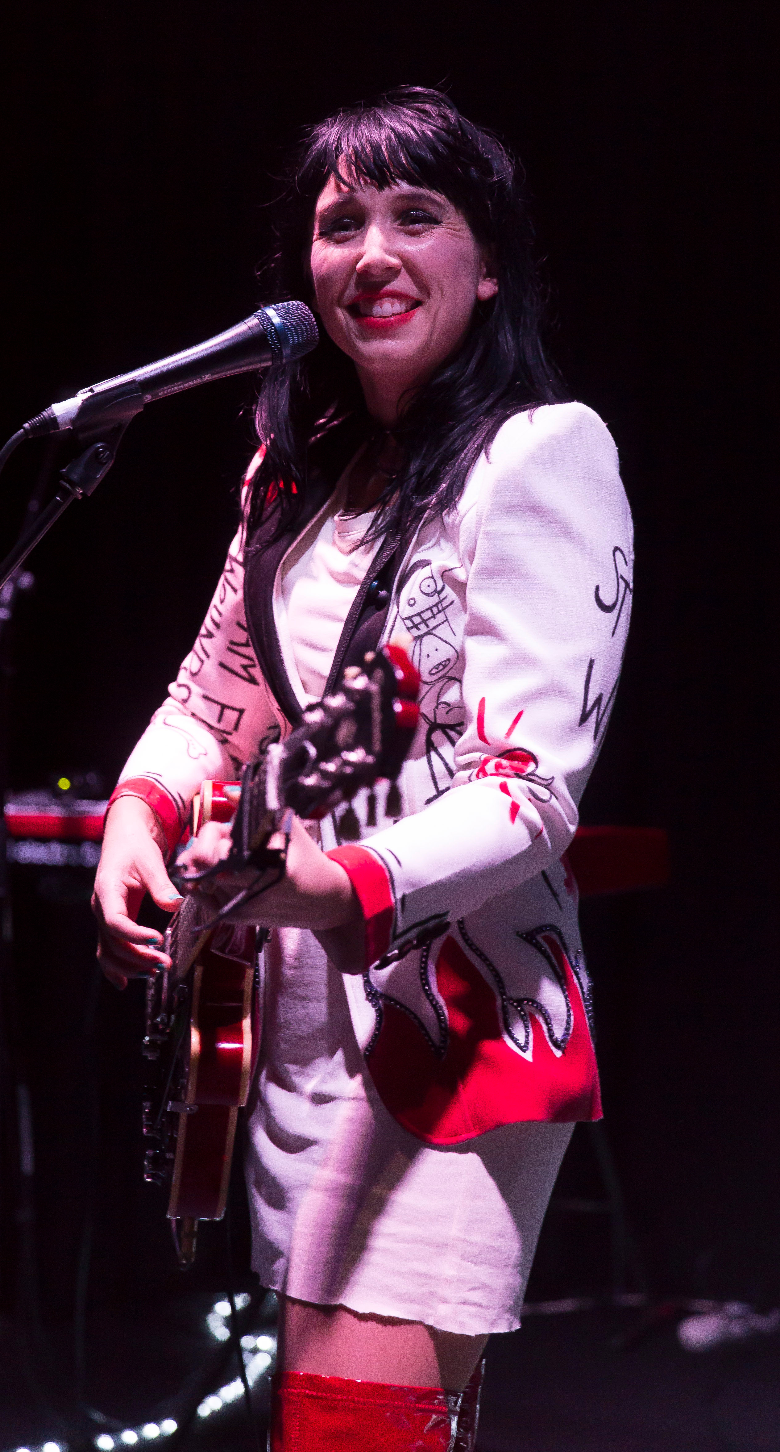 Katy Steele